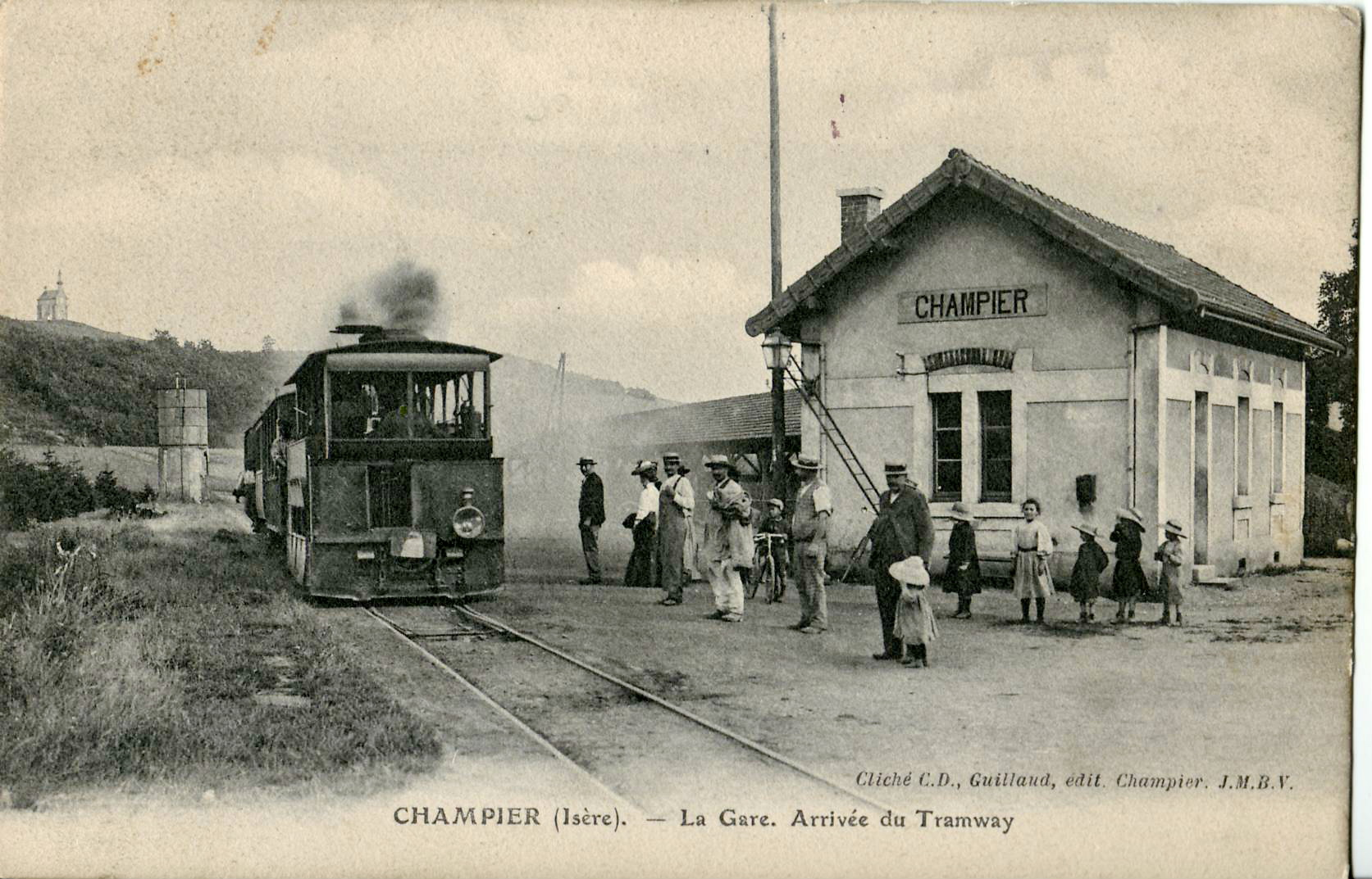 Carte postale ancienne éditée par Guillaud à Champier :CHAMPIER - La Gare - Arrivée du Tramway (Tramway de Voiron à Charavines et de Charavines à Vienne (C.E.N.) 1891-1936)